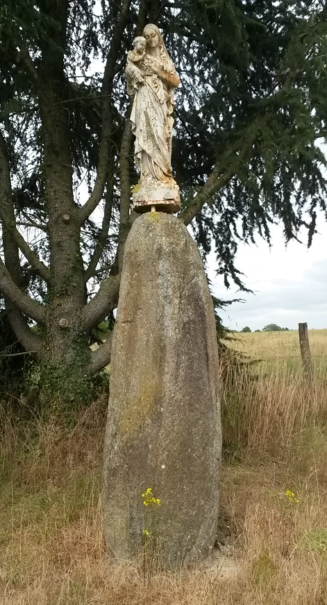 Statue Vierge à l'enfant sur mégalithe à Treize-Septiers, Vendée, France